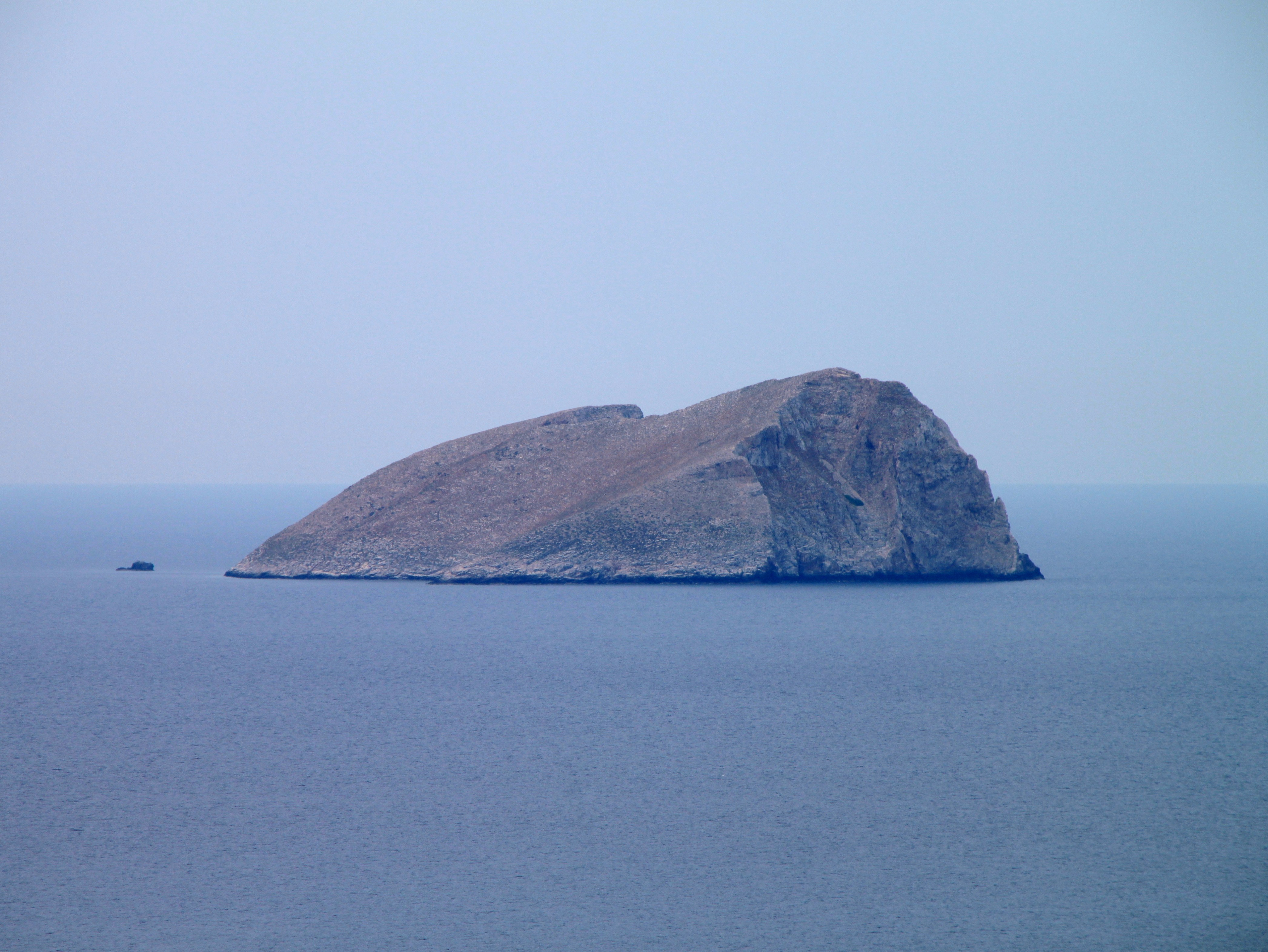 Pondikonisi, Felsinsel in der Gemeinde Kissamos, Präfektur Chania, Kreta, Griechenland